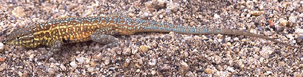 Uta stansburiana Male